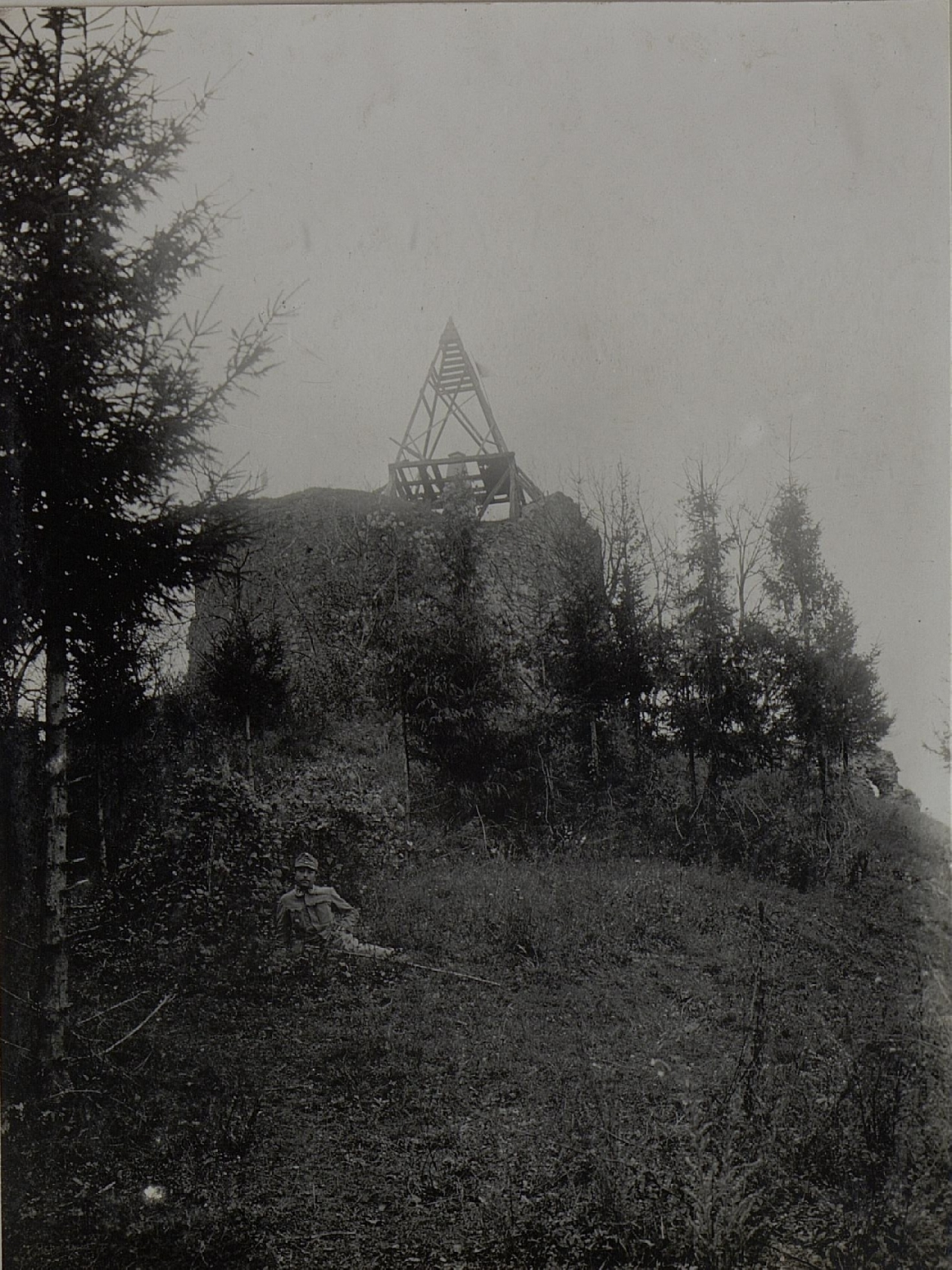 Ruine am Avala. Oktober 1915.